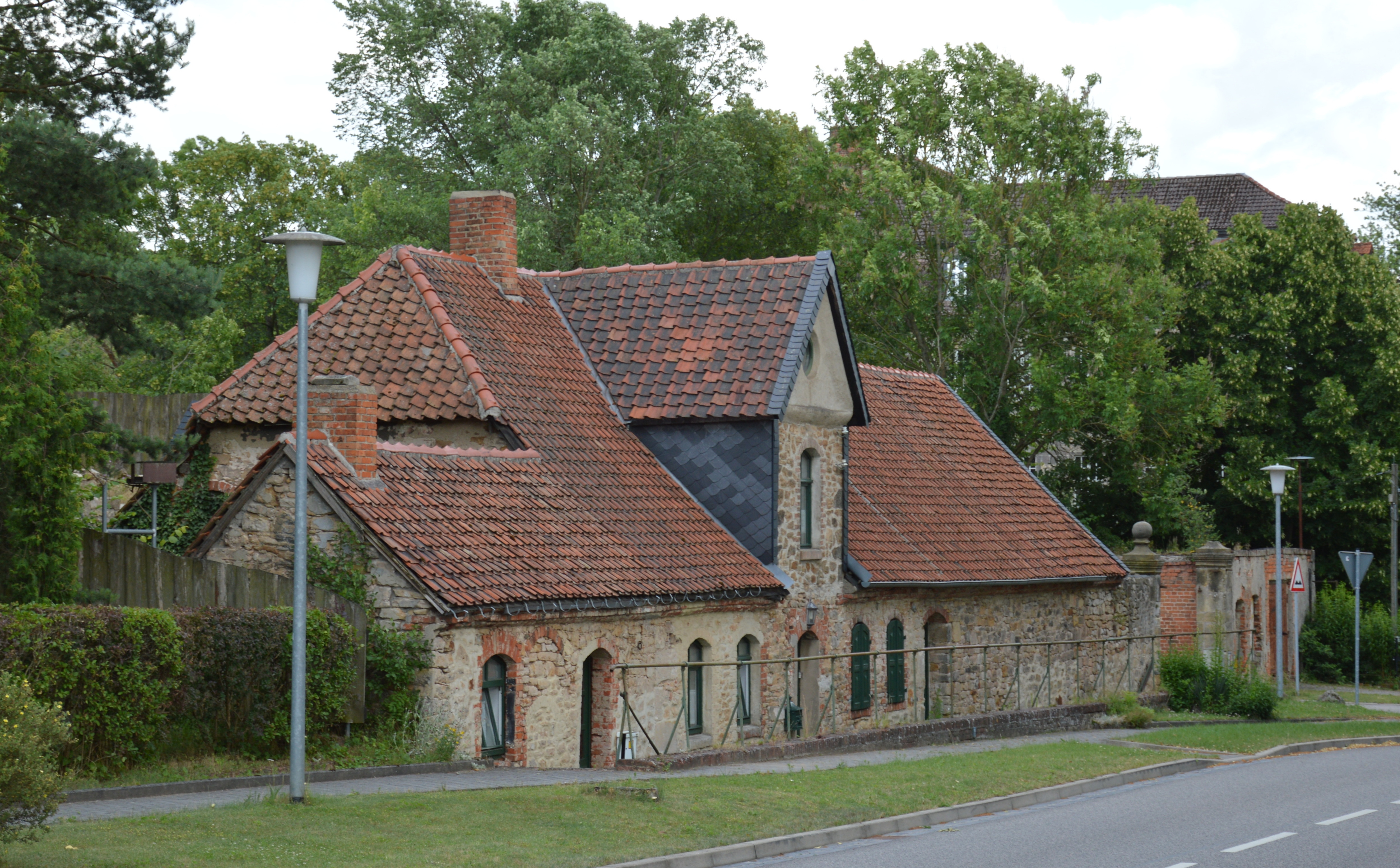 Haus Dorfstraße 11 in Groß Bartensleben